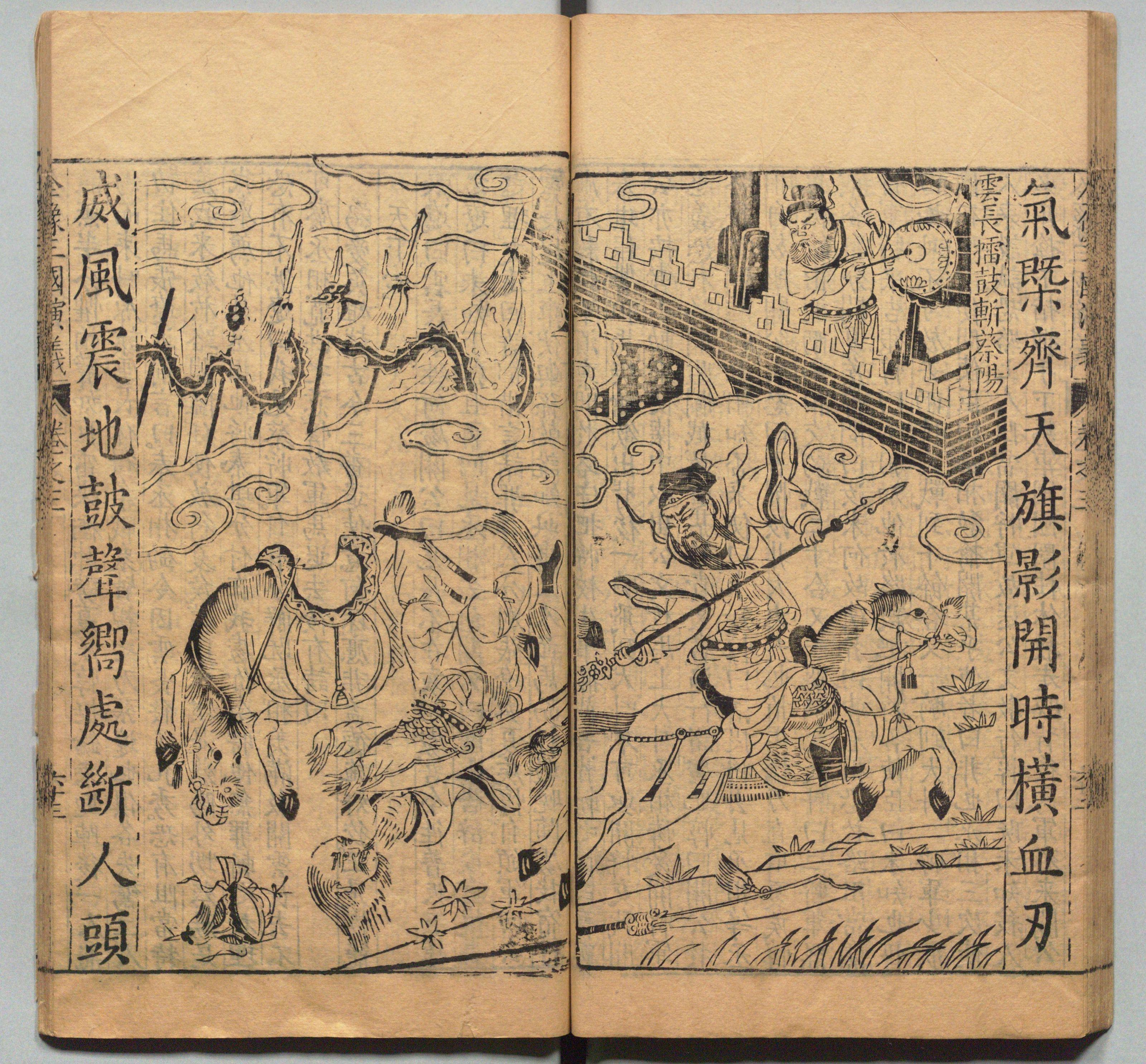 新刊校正古本大字音释三国志通俗演义 明万历十九年书林周曰校刊本